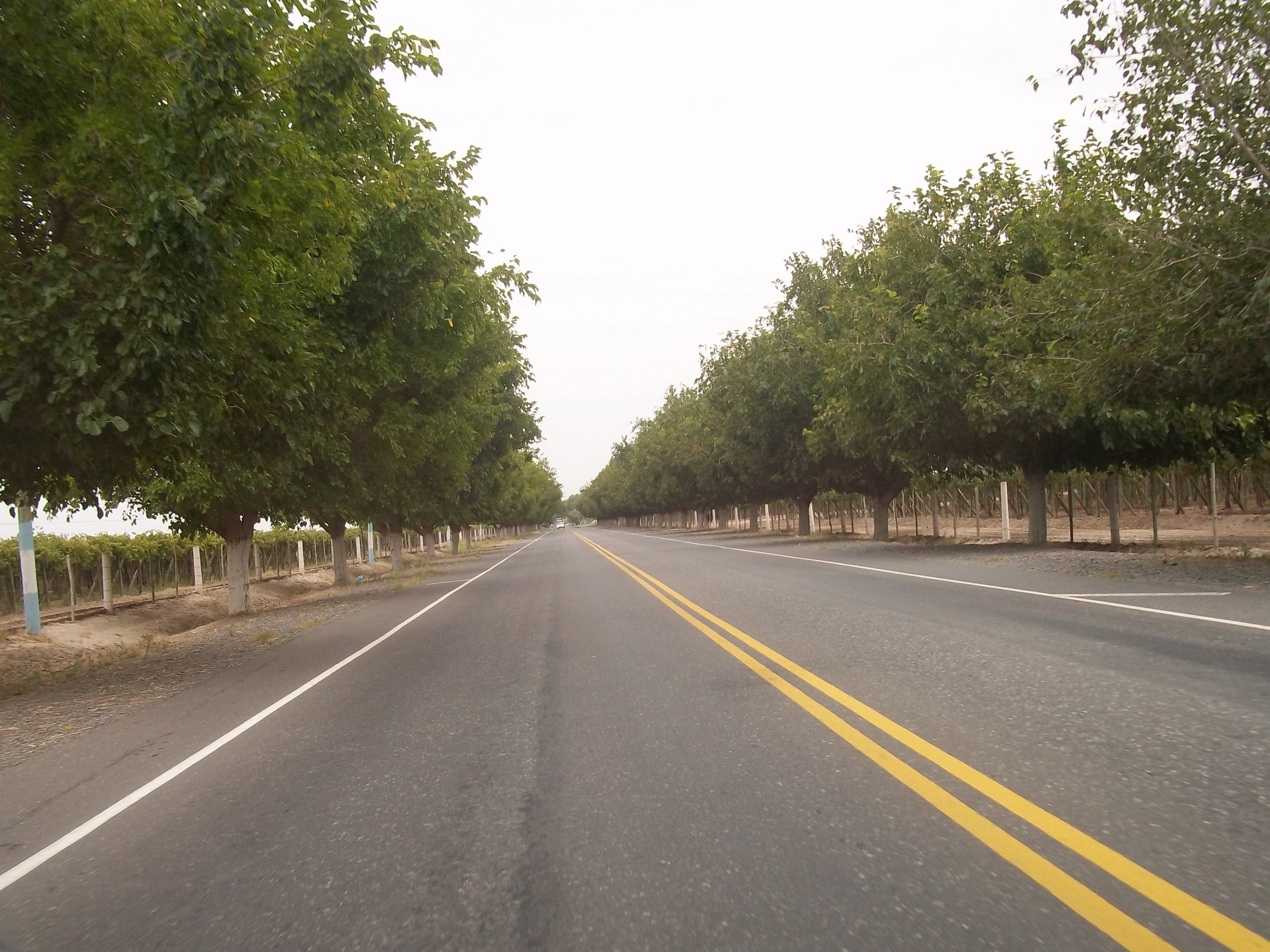 Vista de la Ruta Nacional 20 en cercanías a la localidad de Pie de Palo en el departamento Caucete, provincia de San Juan, Argentina.